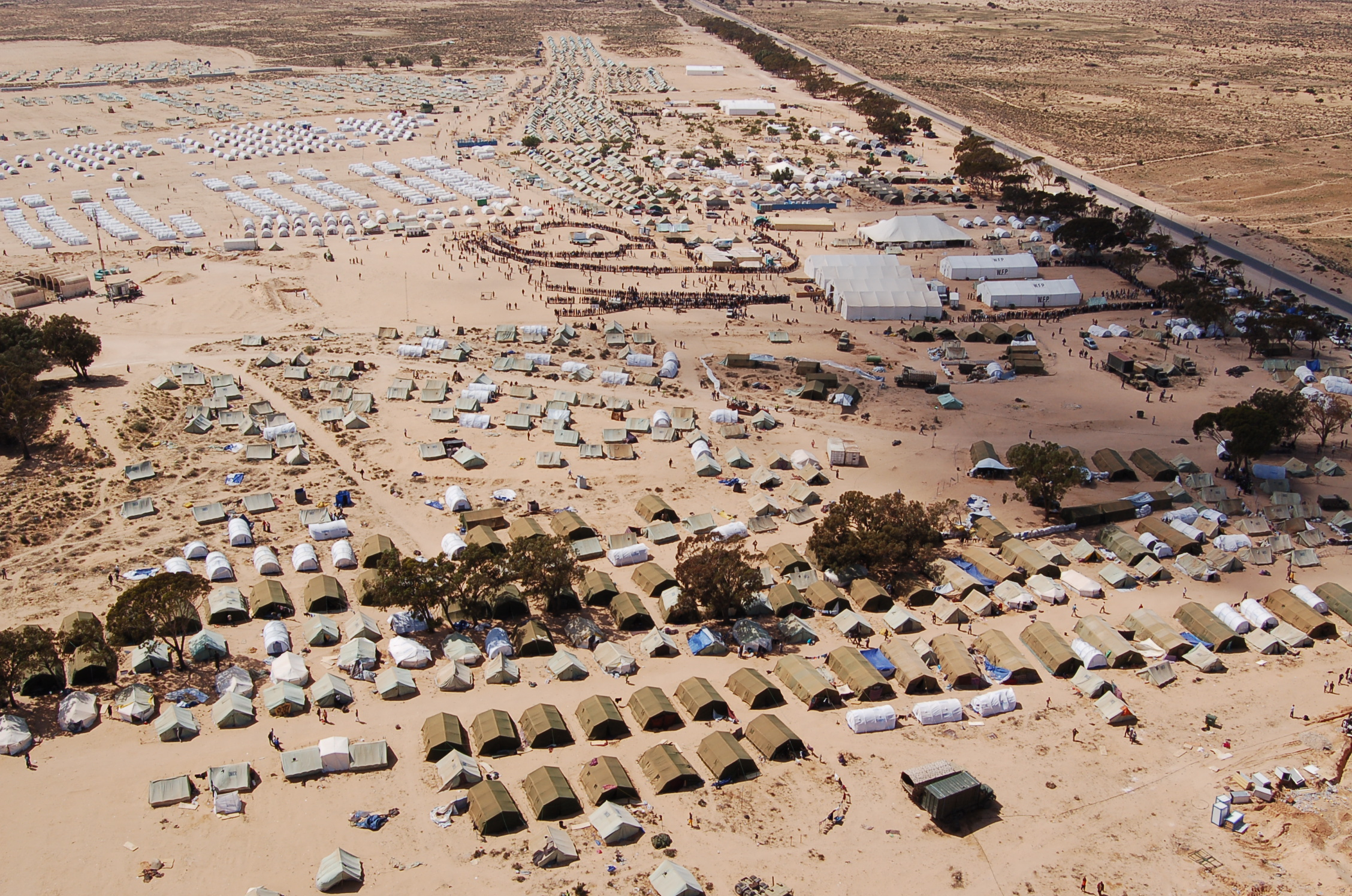 Le camp de réfugies de Choucha à coté de Ras Jedir, au sud de la Tunisie